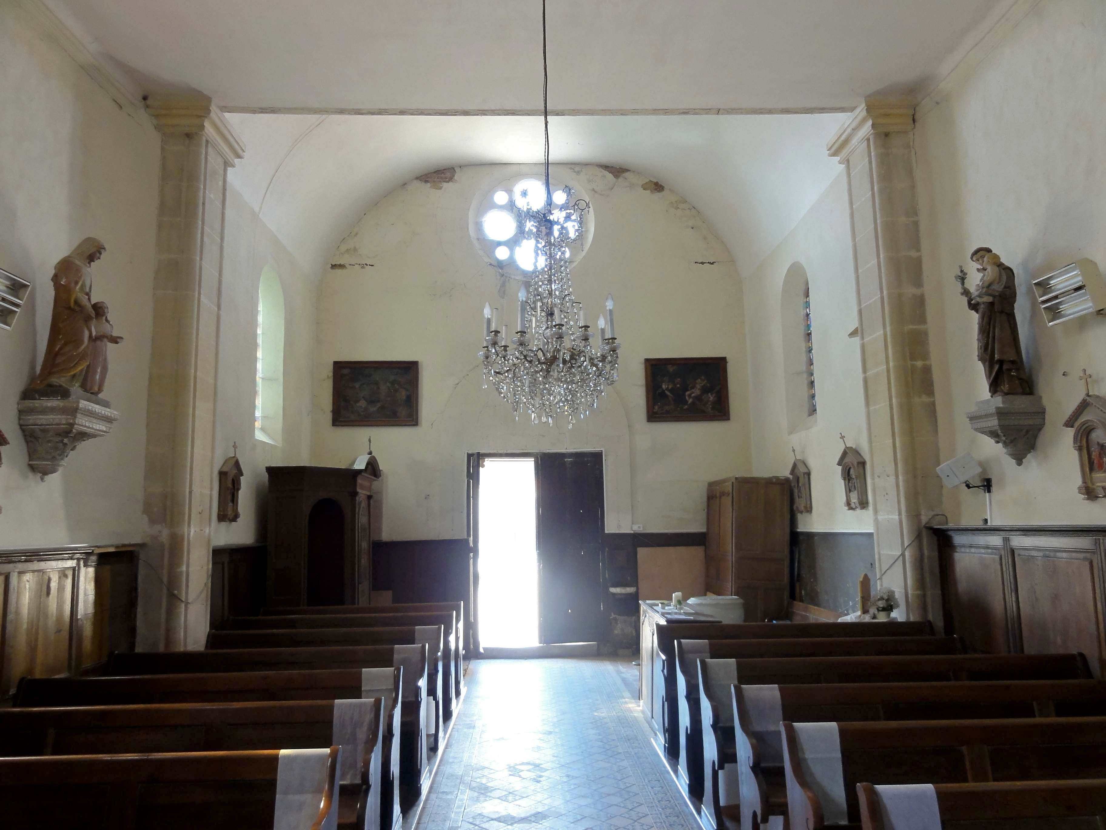 Intérieur de l'église - voir titre.